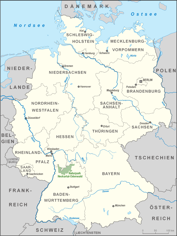 Karte des Naturparks Neckartal-Odenwald in Deutschland